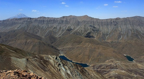 خط الراس ماز و دریاچه تار و هویر